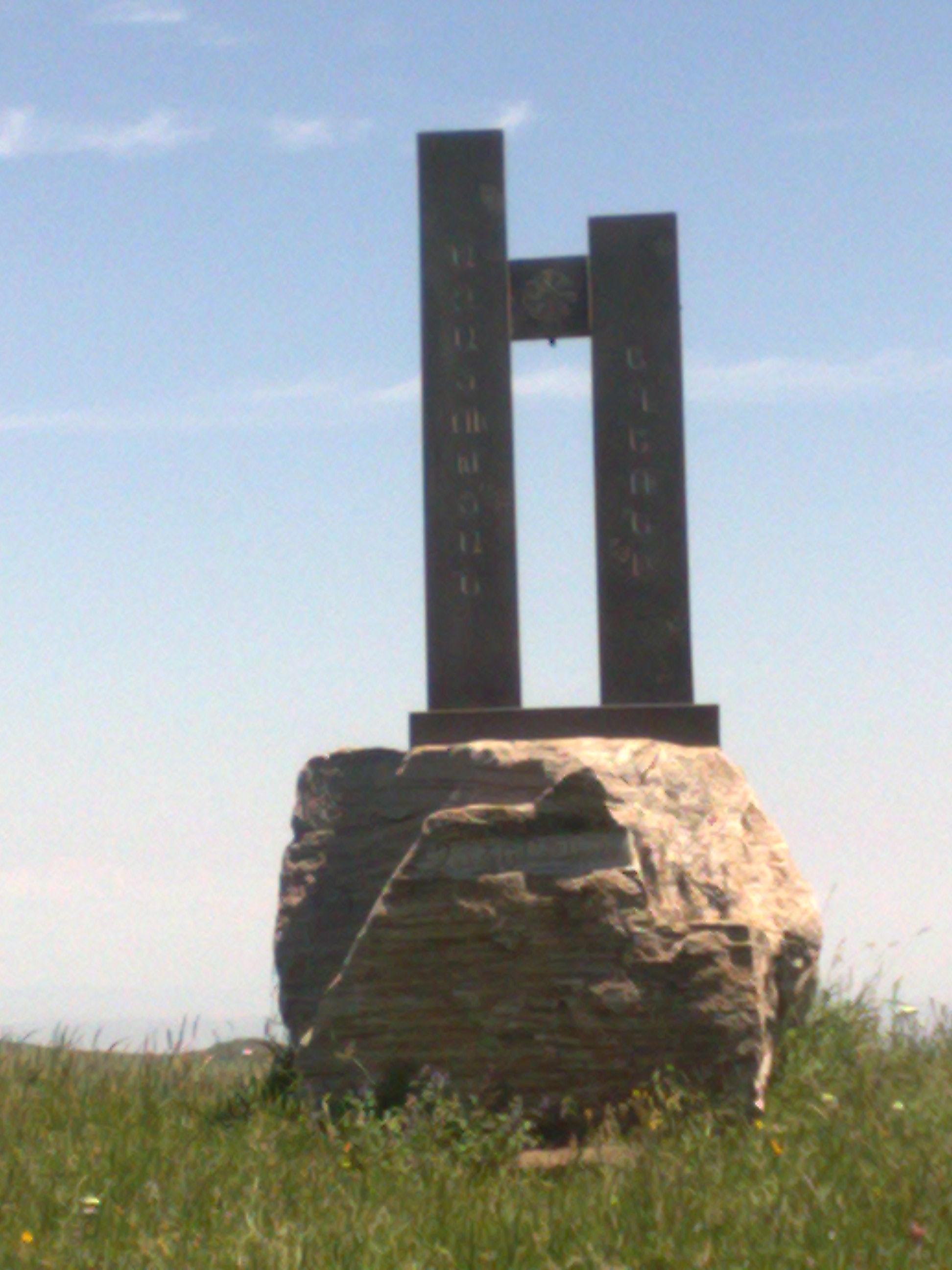 Մեծ Եղեռնի և Հայ ազգի ազատության հուշարձան